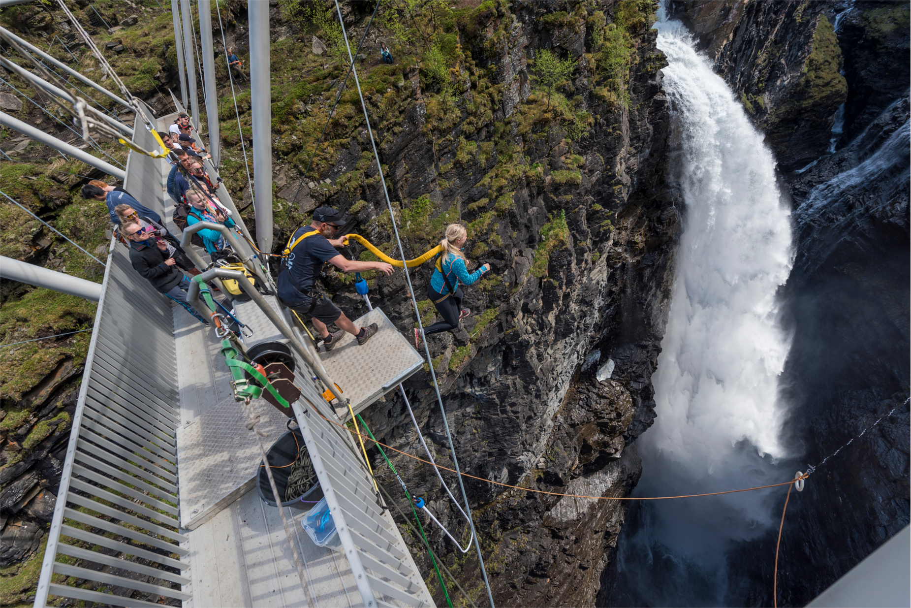 Strikkhopp fra Gorsabrua